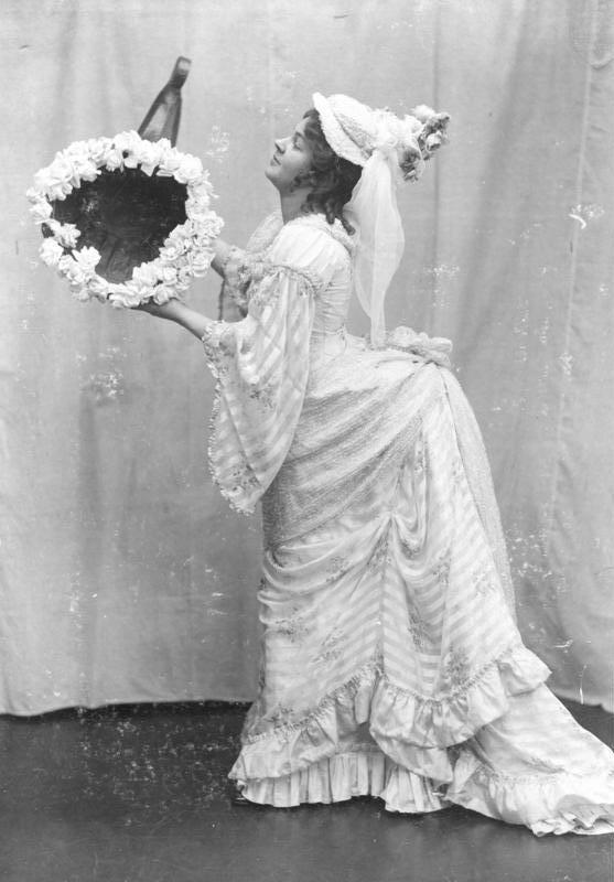 Leopoldine Konstantin Aufführung von "Lumpacivagabundus" im Deutschen Theater Leopoldine Konstantin als "Fortuna"